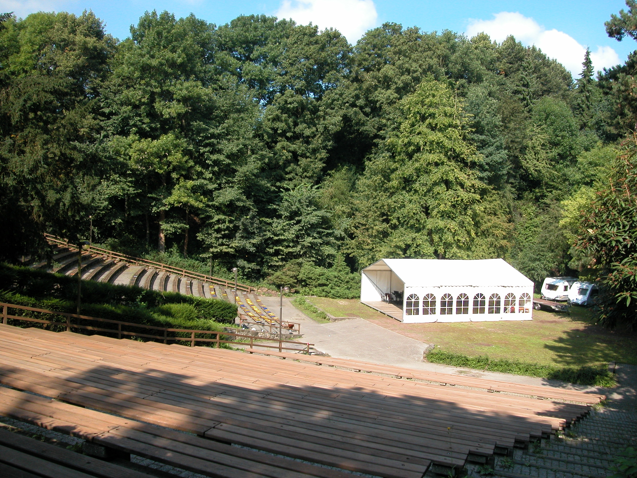 Freilichtbühne